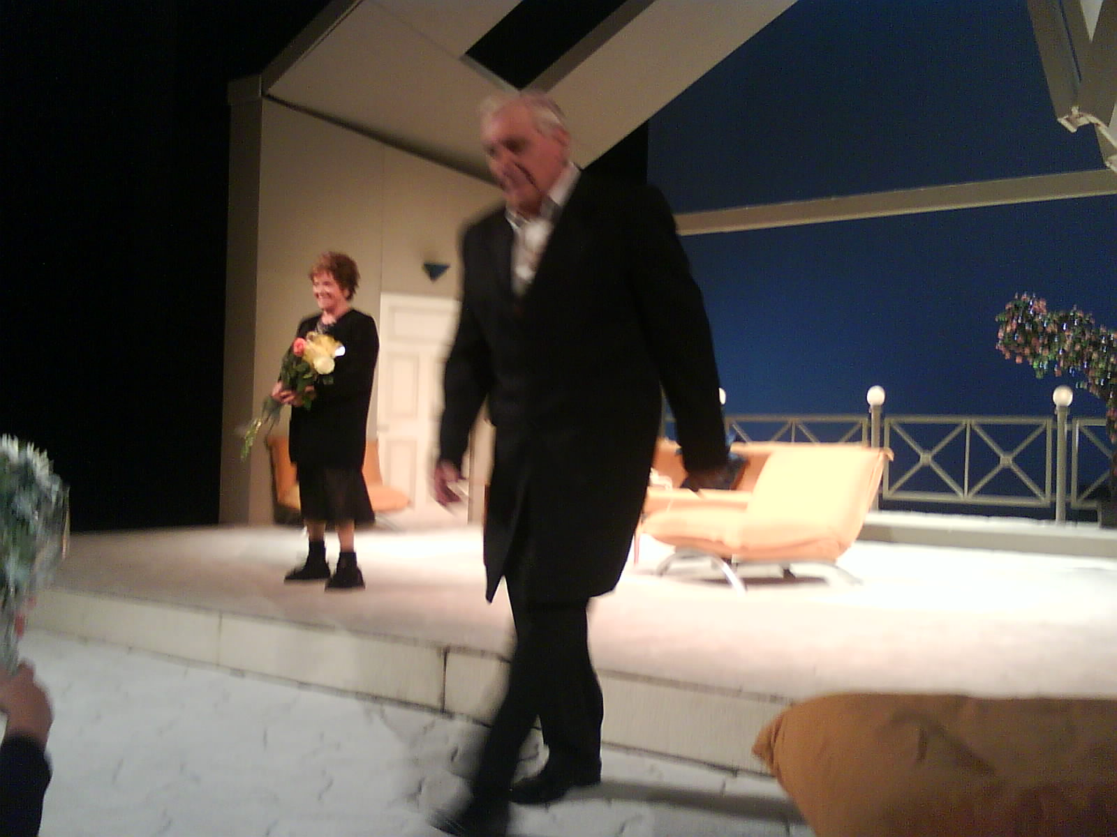 Алиса Фрейндлих (сзади) и Олег Басилашвили после спектакля "Калифорнийская сюита", февраль 2009, БДТ